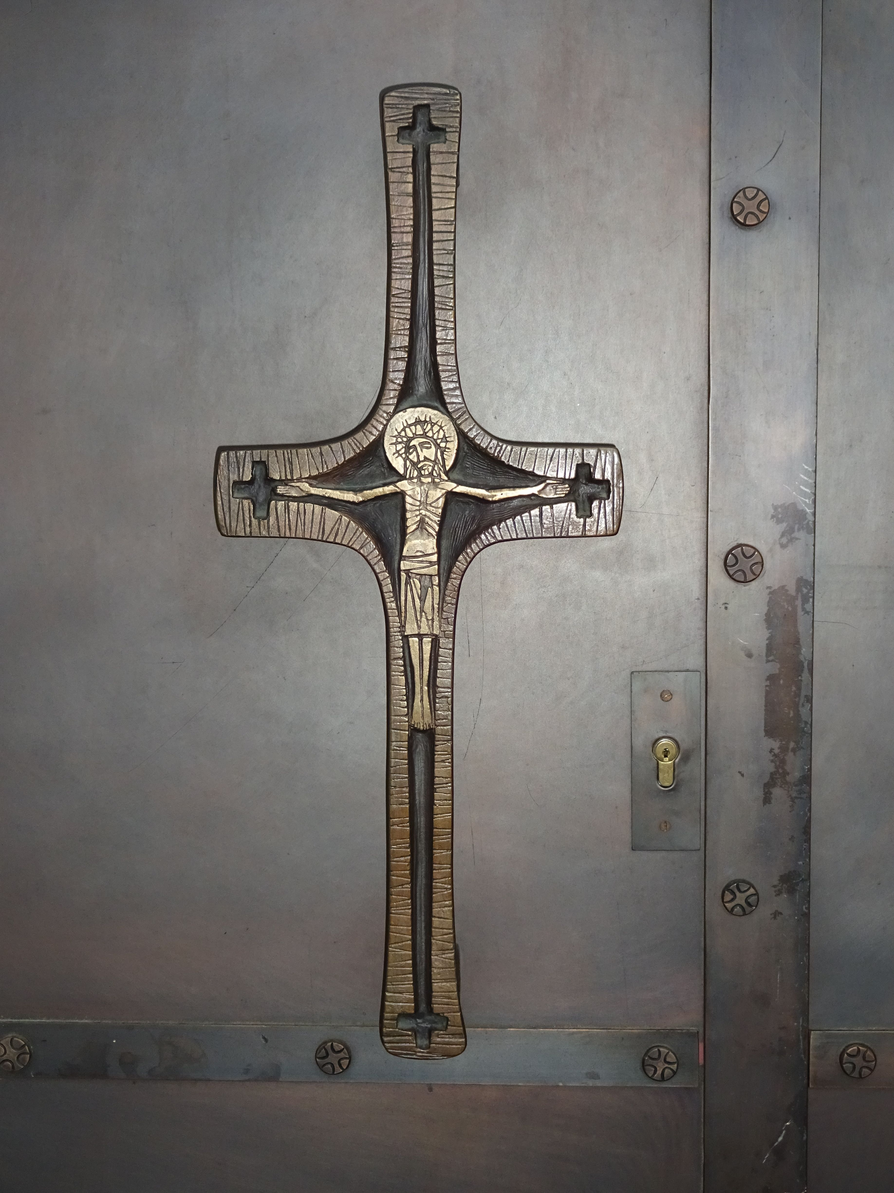 Pauluskirche, Innsbruck-Reichenau: Türgriff an der Außenseite des Hauptportals, Gekreuzigter von Max Spielmann